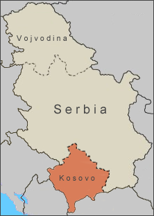 Kosovo's position